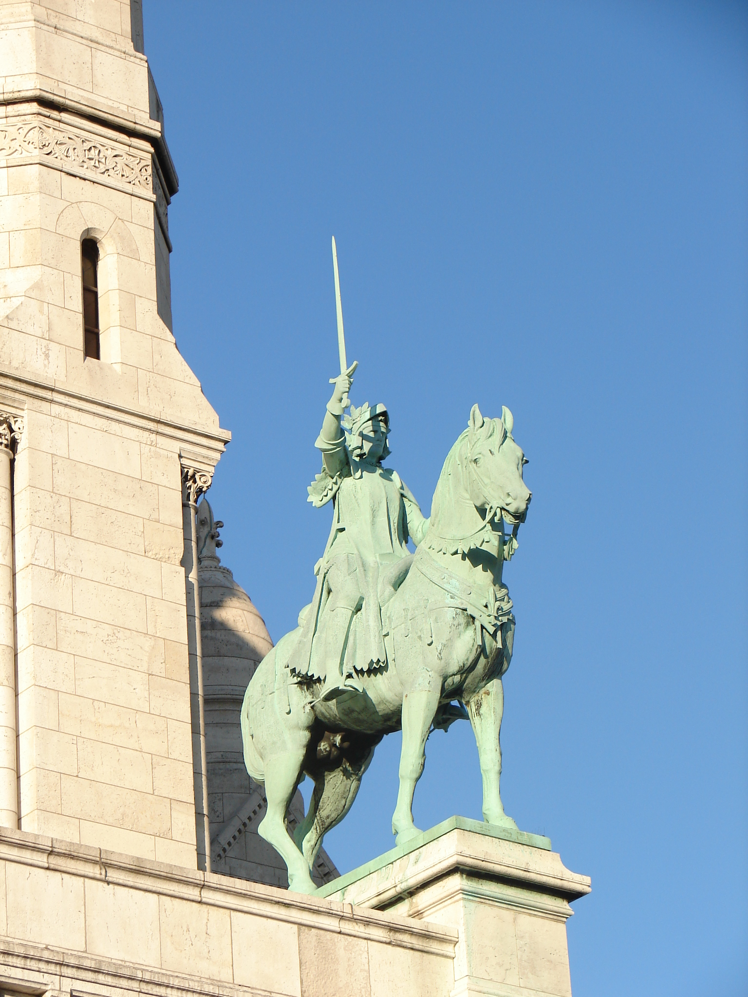 Cheval de la façade du Sacré Coeur de Montmartre